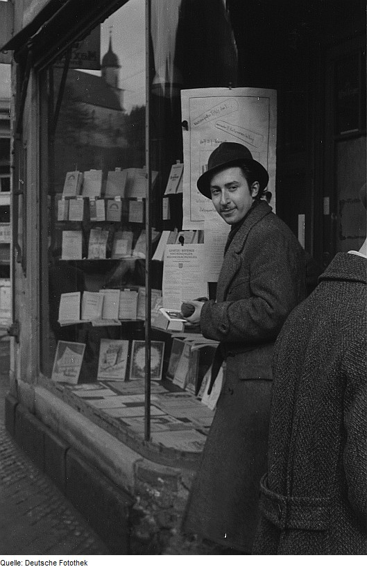 Original image description from the Deutsche FotothekJunger Mann (Rolf) an einer Buchhandlung